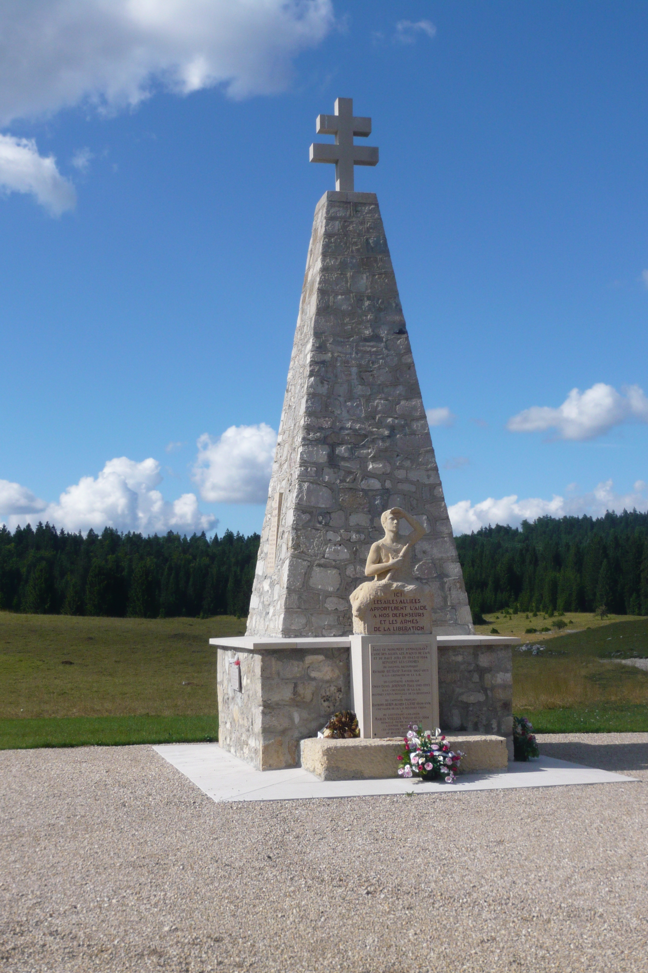 monument aux maquis et SAS plaine d'Echallon